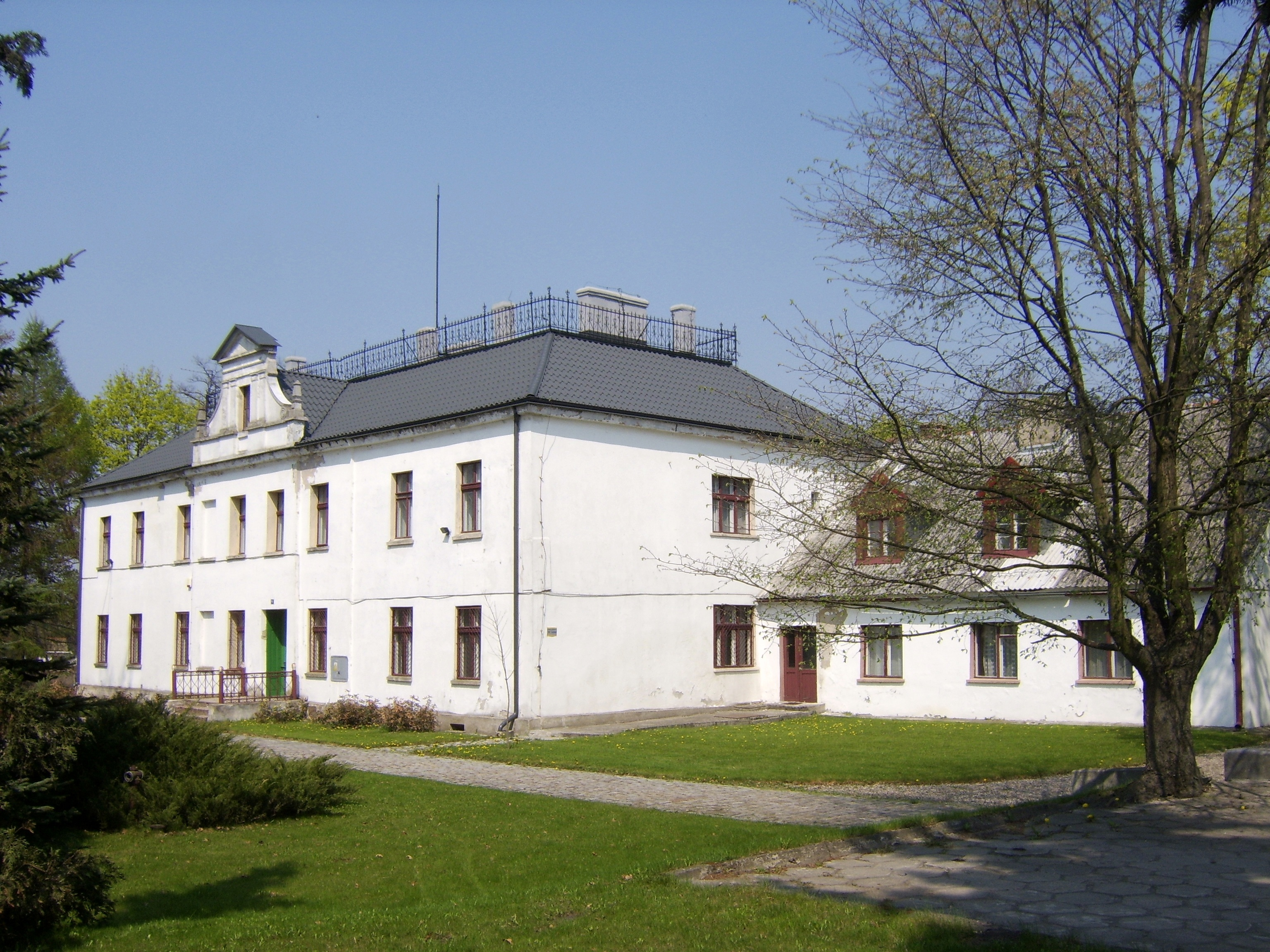 park dworski, 2 poł. XIX w. Zegartowice, Gmina Papowo Biskupie